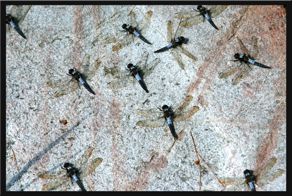 Several male Ladona julia resting on a rock